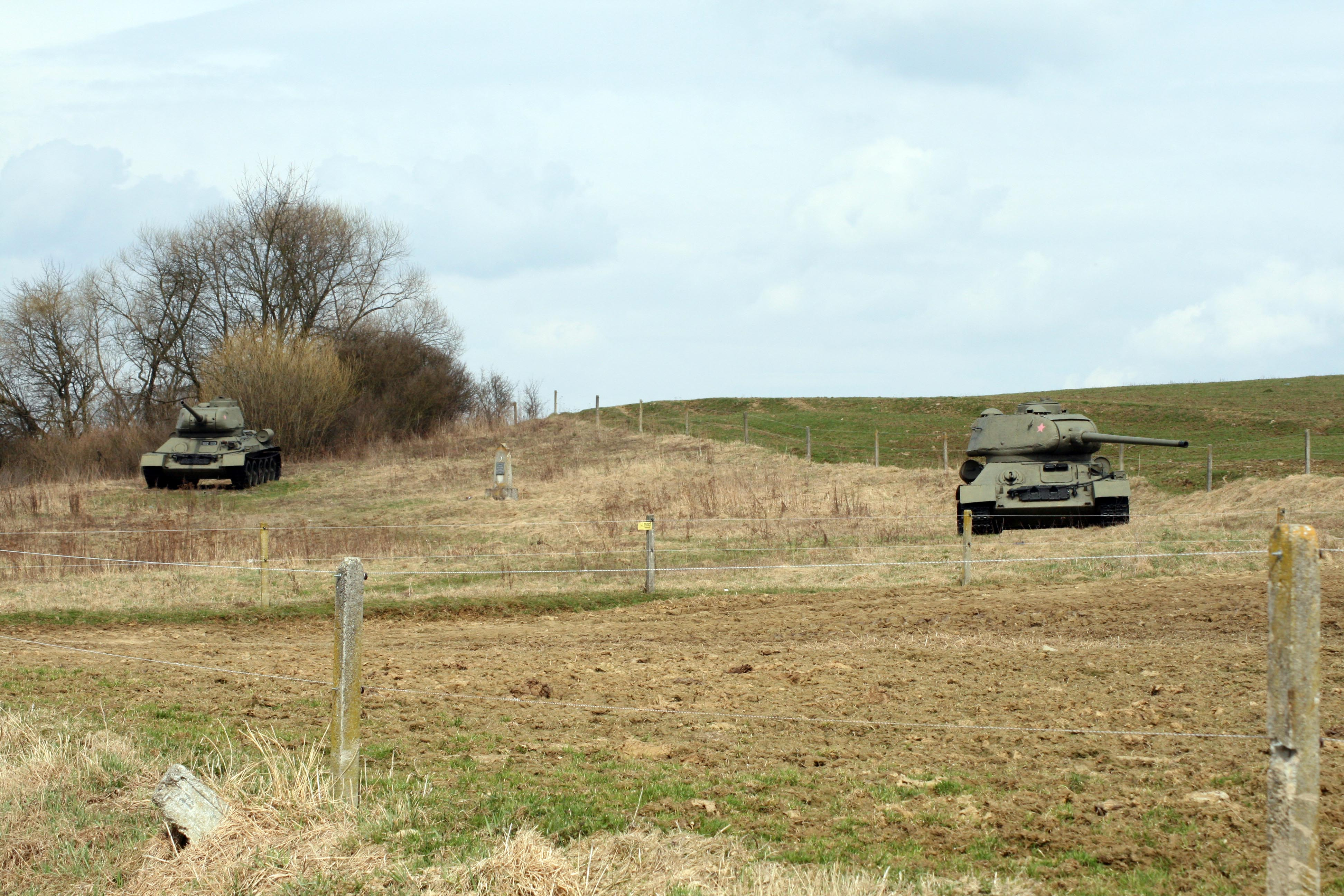 Tankový výsadok pred obcou Kapišová